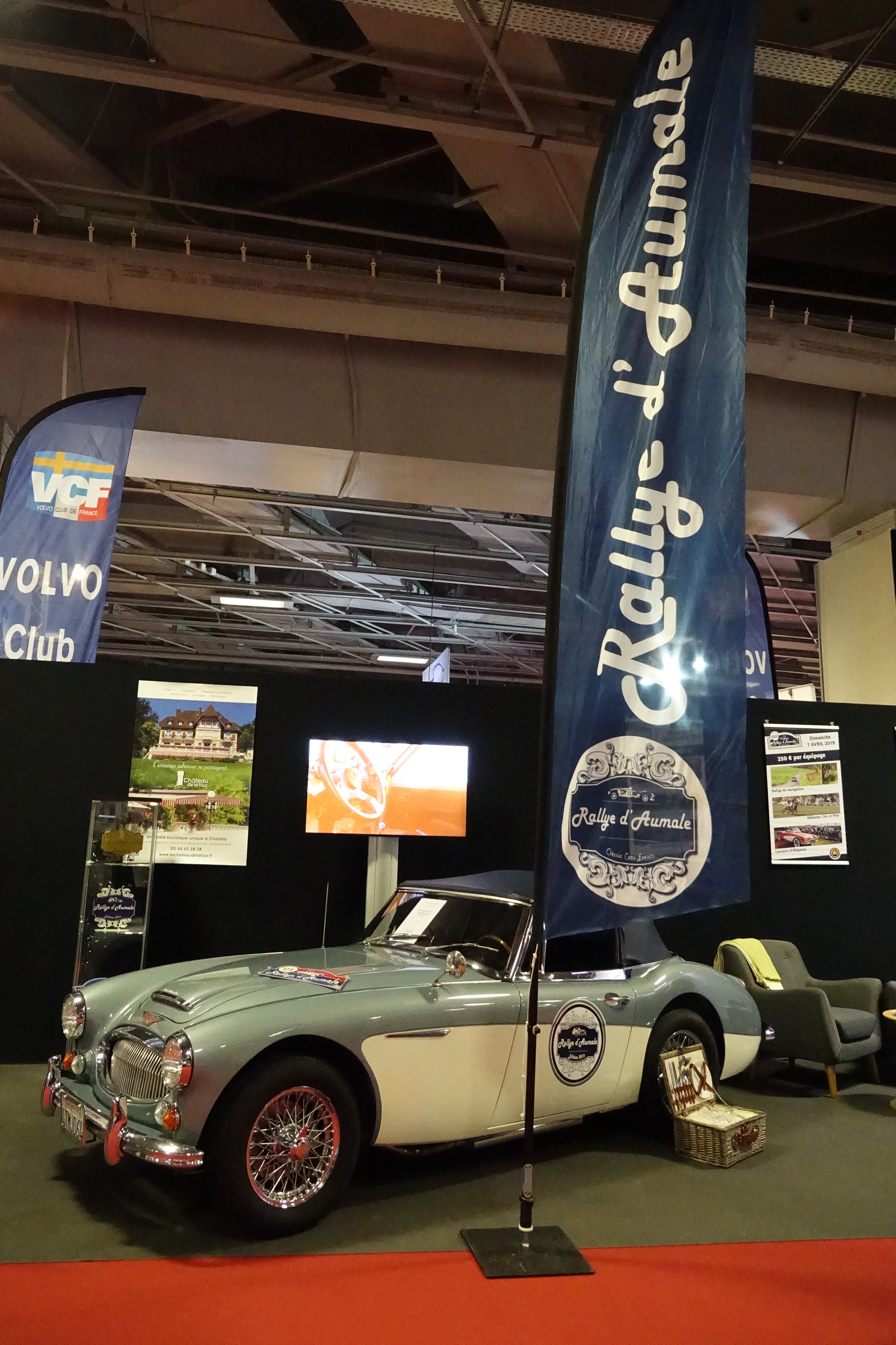 Rallye d'Aumale à Rétromobile 2019